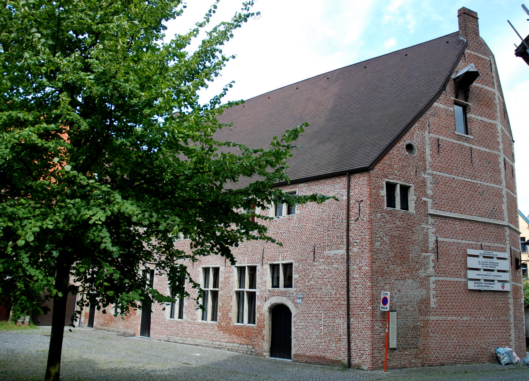 Cellenbroedersklooster in Mechelen, België